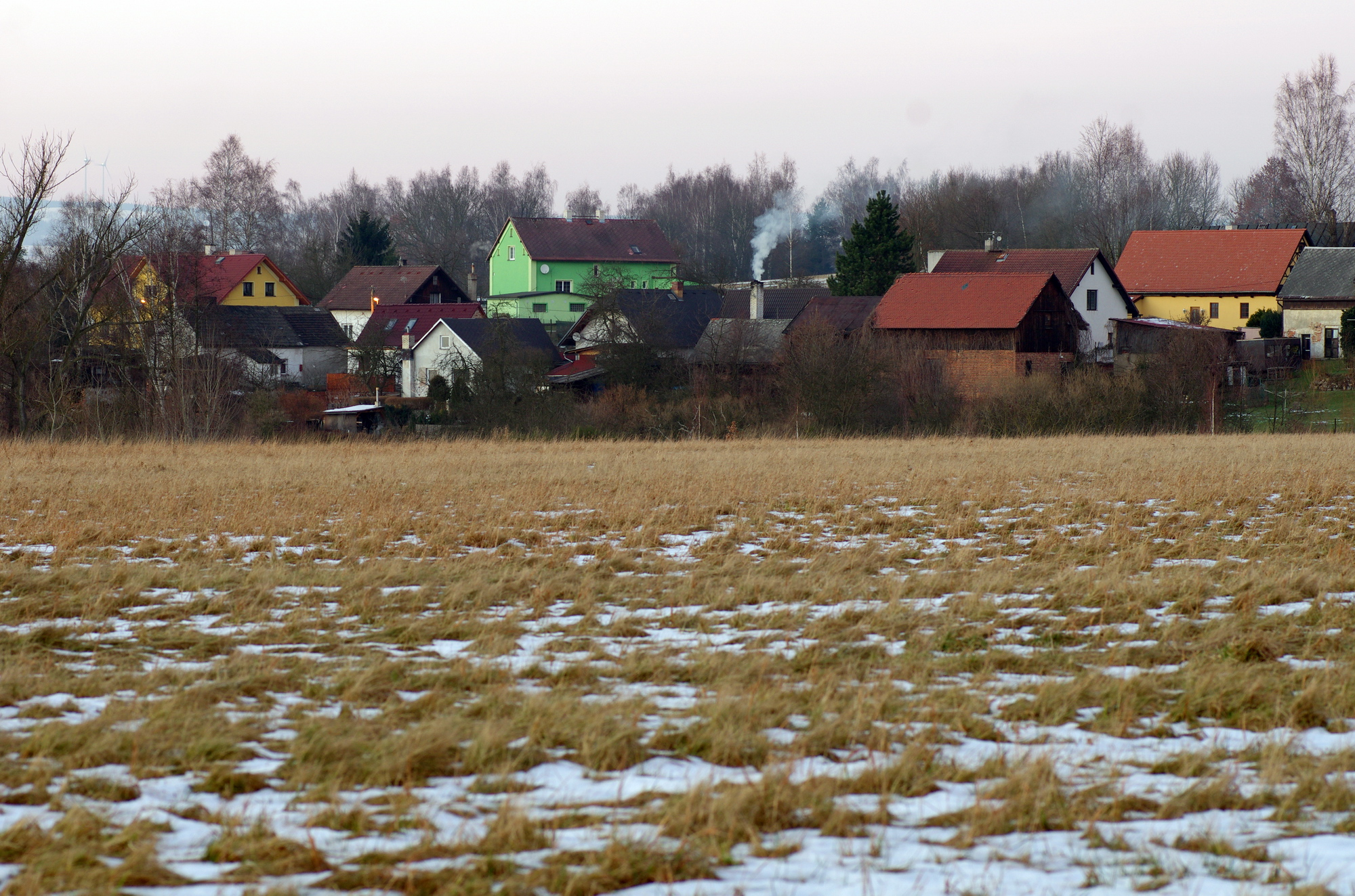 Dolní Rychnov, jižní okraj obce, okres Sokolov